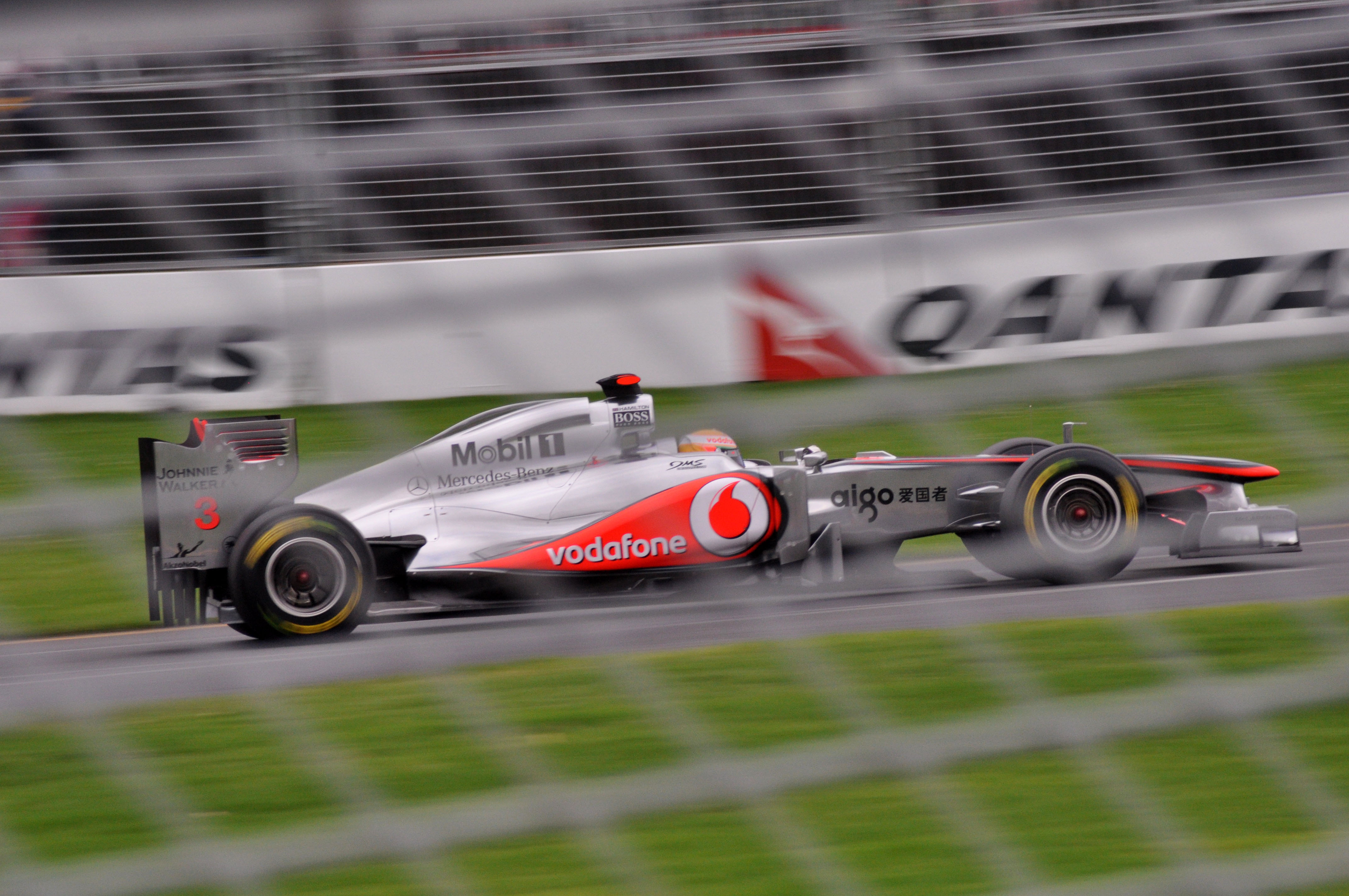 Aus F1 GP Weekend 2011 88